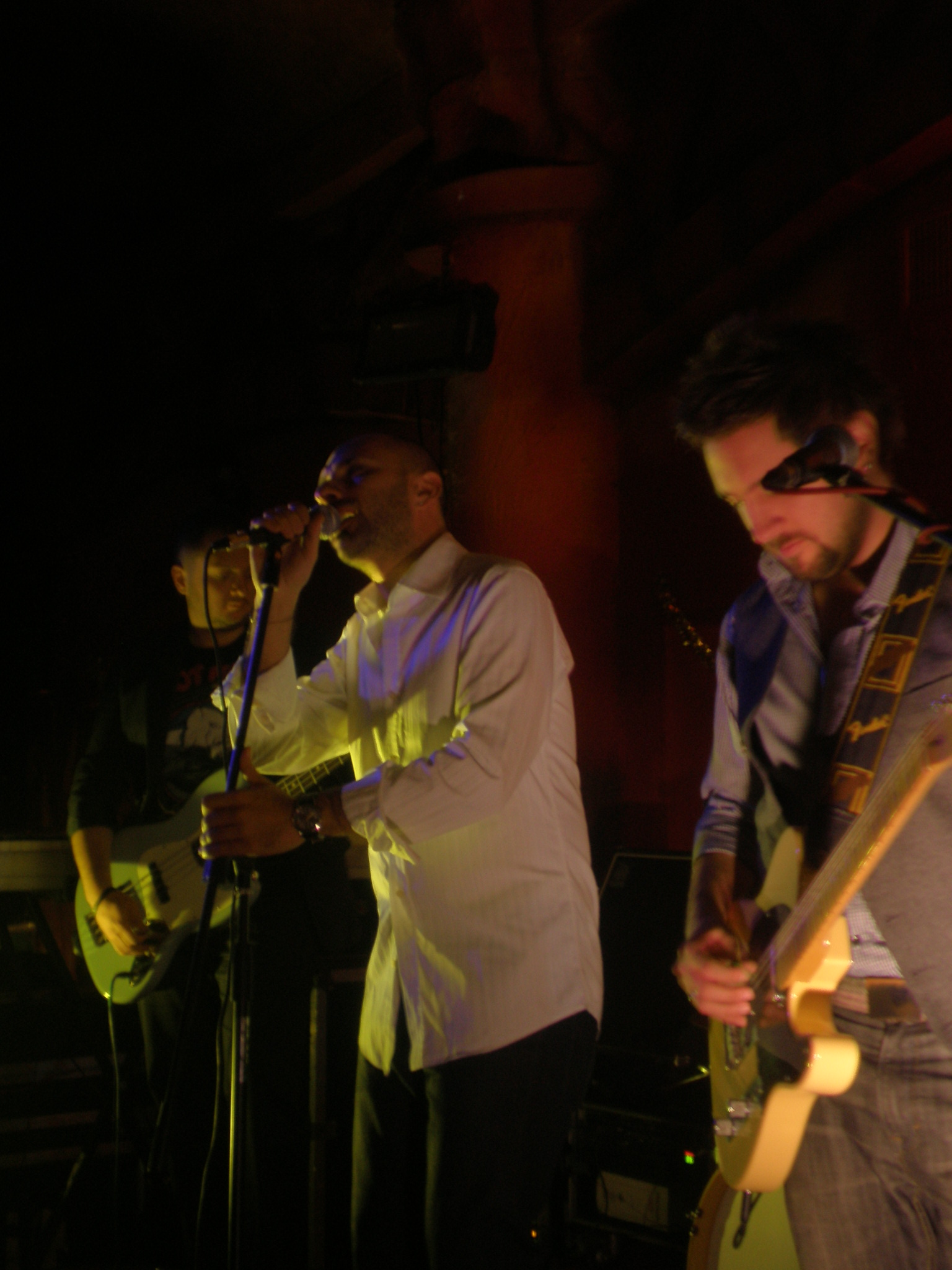 Gripin on stage at Kaktüs Bar, Antalya, Turkey